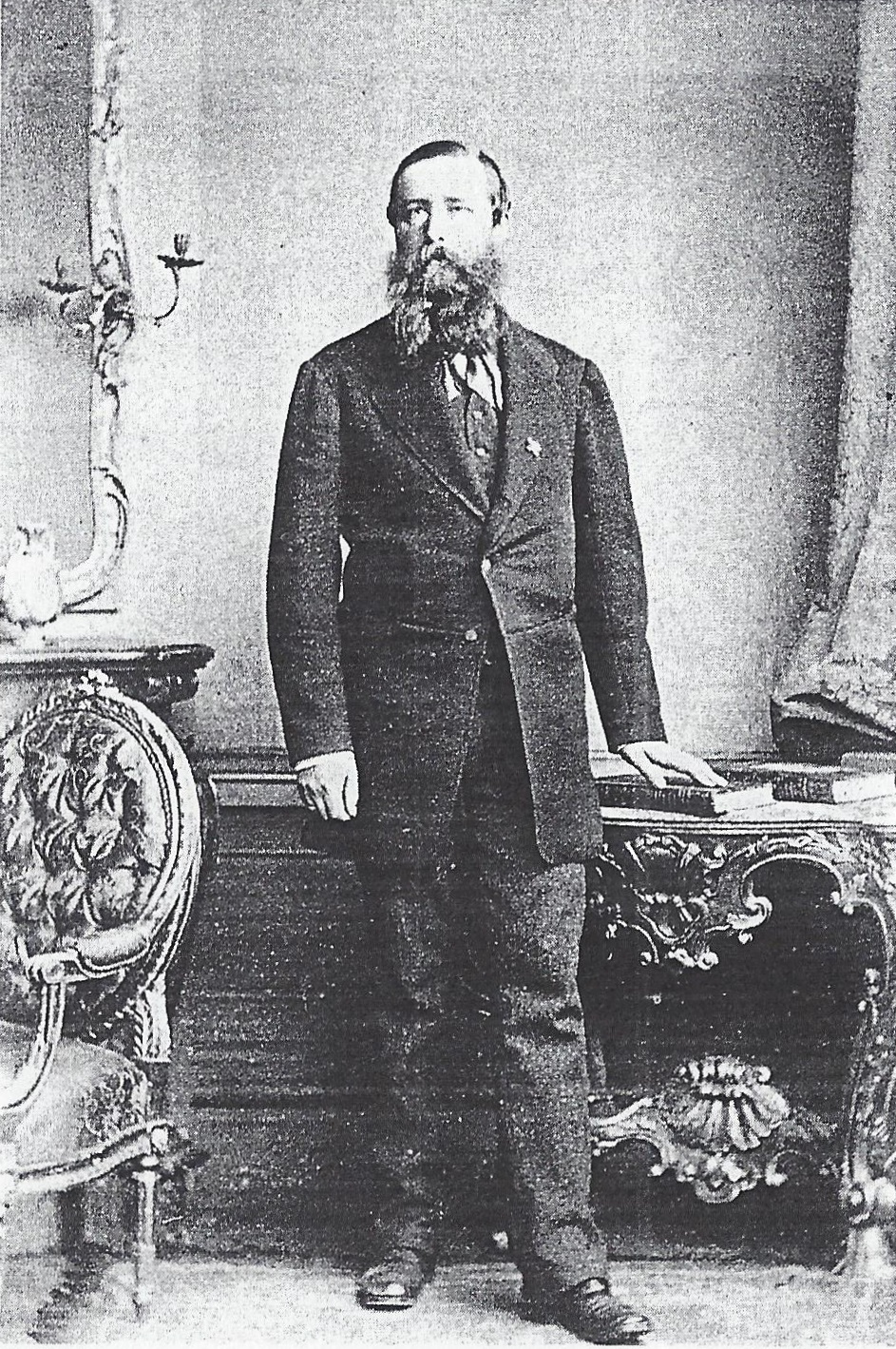 Fotografie des Grafen Karl von Lehndorff